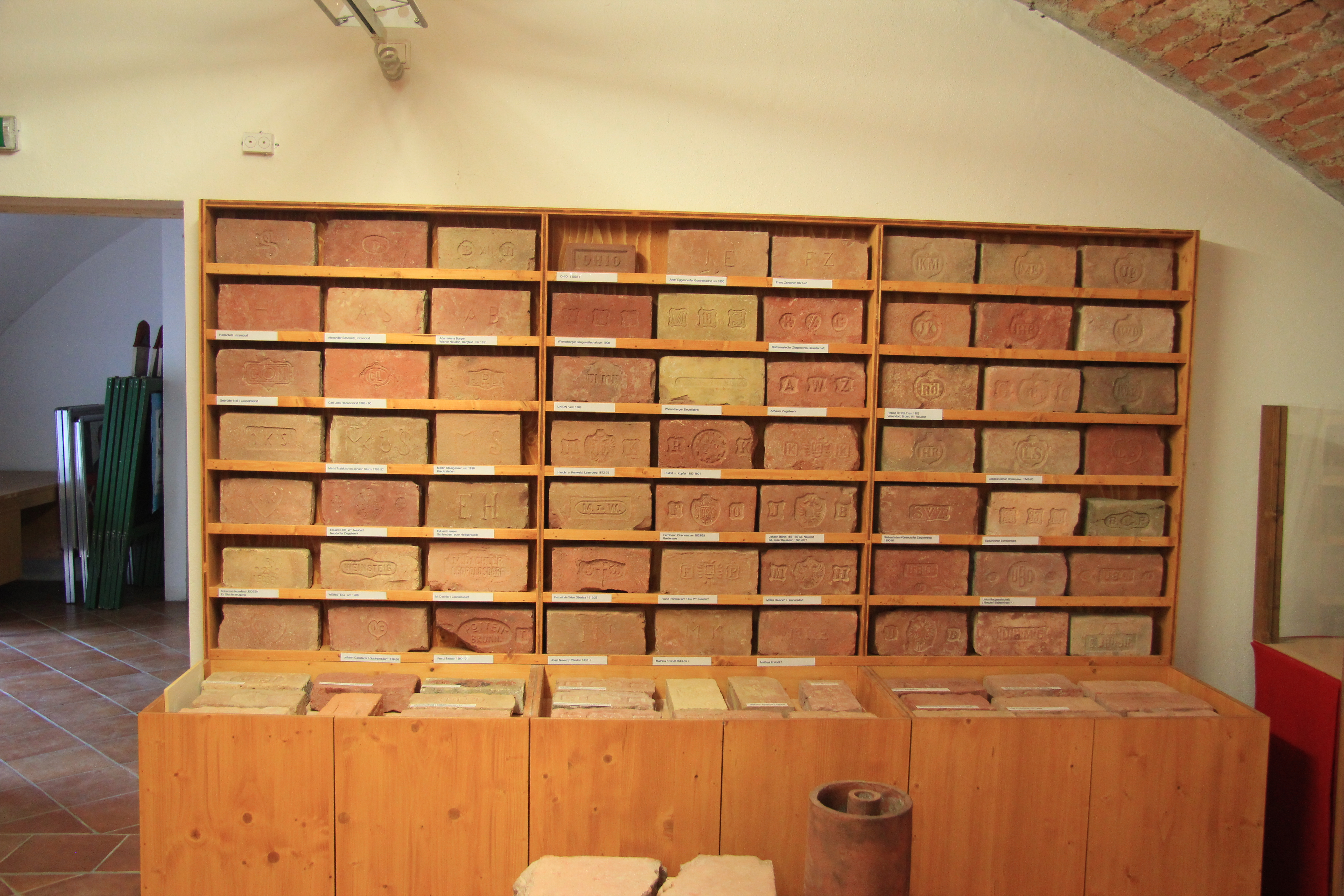 Ausstellungsstücke im Heimatmuseum in Vösendorf